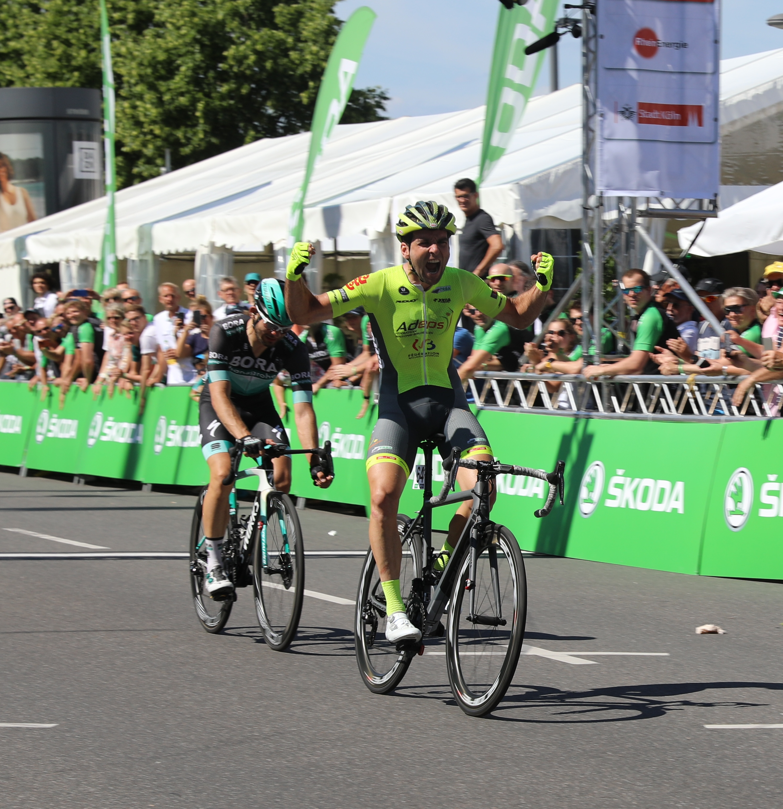 Baptiste Planckaert gewinnt Rund um Köln 2019, vor Christoph Pfingstn